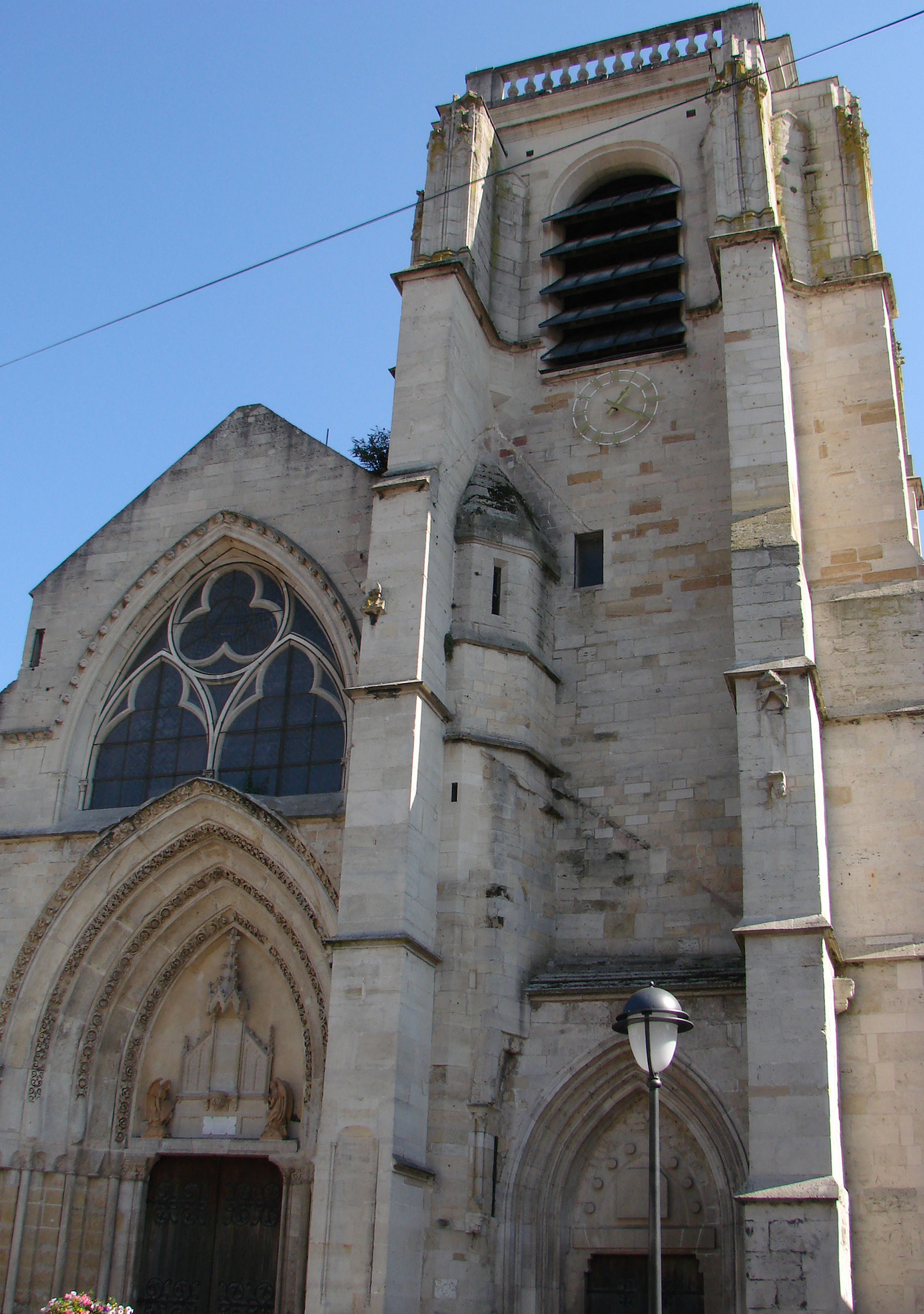 L'église Notre-Dame à Saint-Dizier.